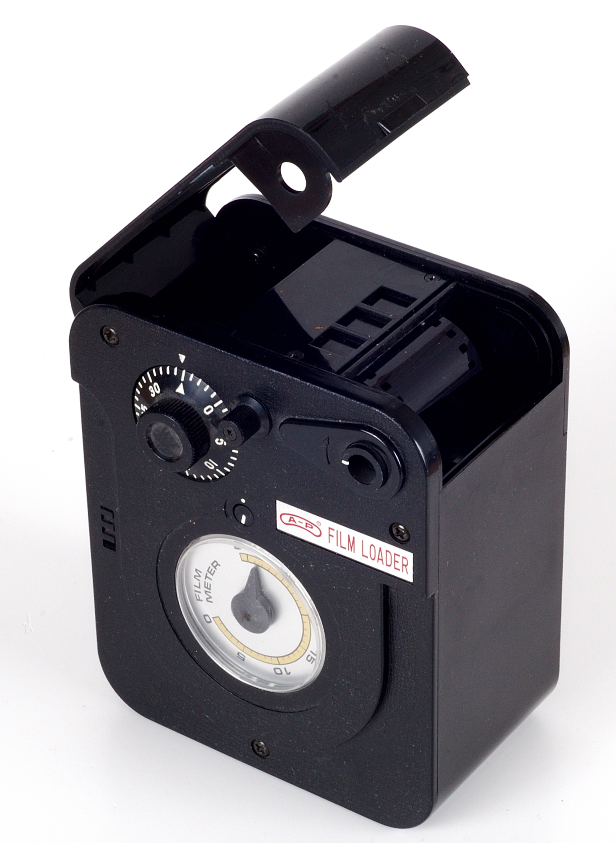 Filmkassette zur Aufbewahrung von Meterware und Nachfüllen von Filmpatronen